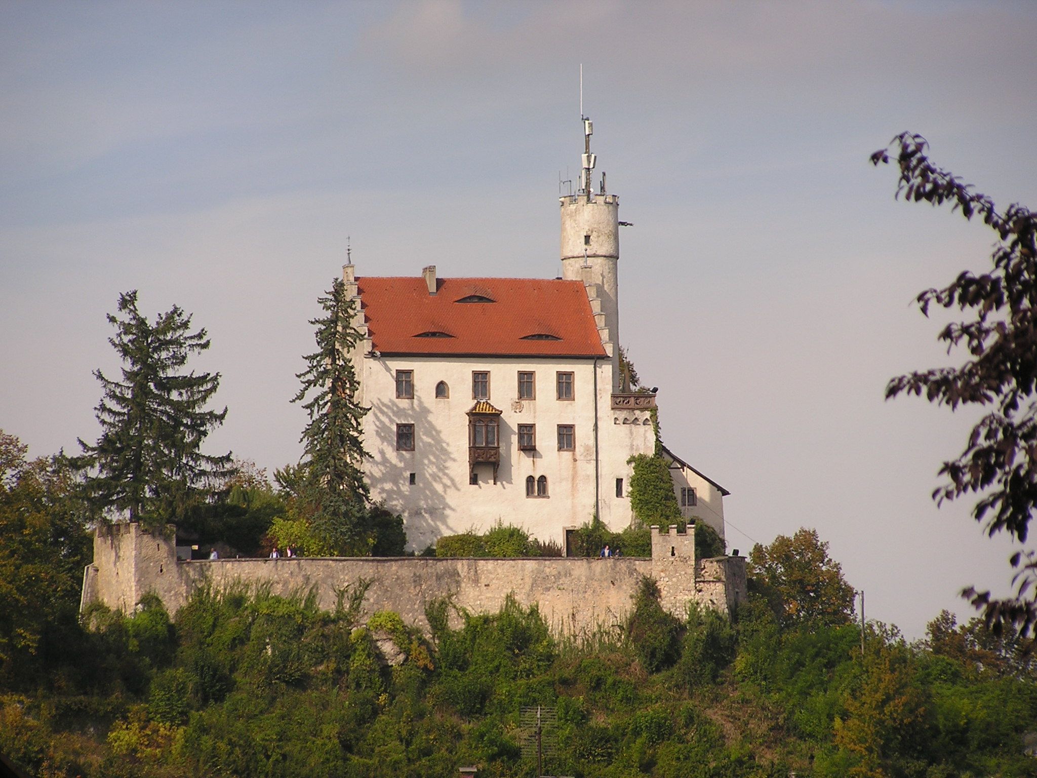 Burg Gößweinstein